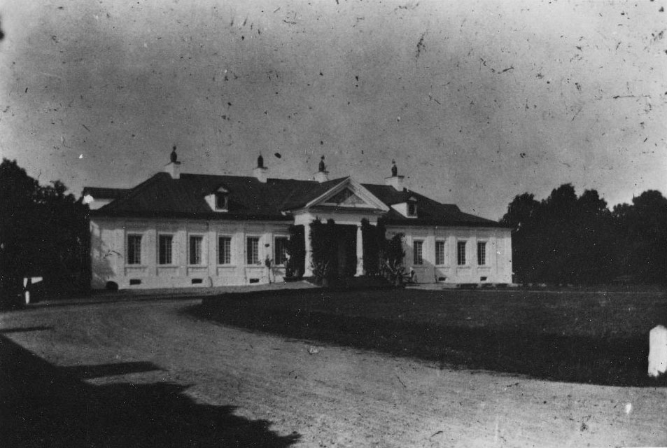 Беларуская (тарашкевіца): Бачэйкаў (Bačejkaŭ), сядзіба Цеханавецкіх (Ciechanaviecki)